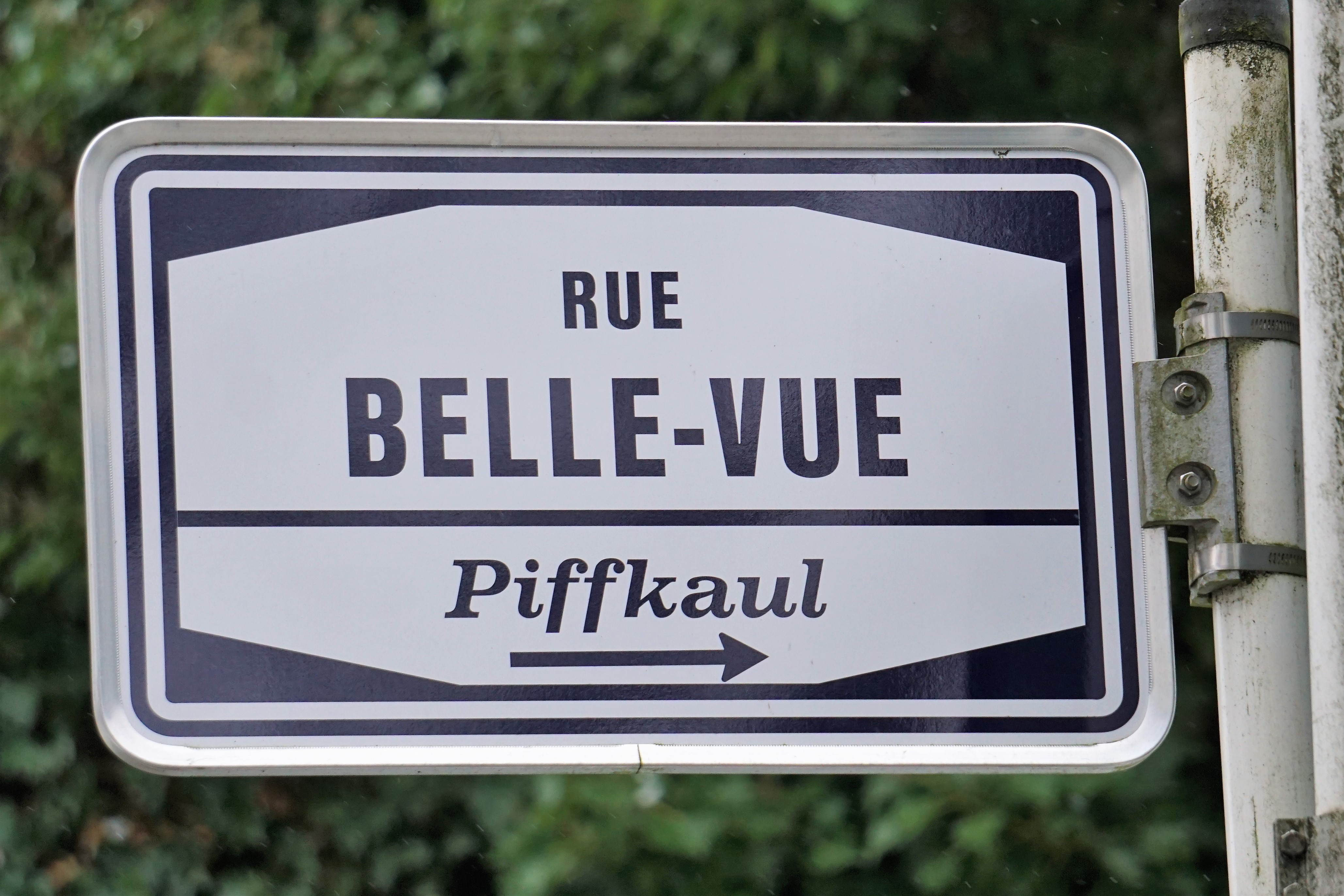 Luxembourg, Plaque de nom de rue à Eich.